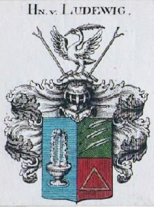 Wappen der Herren von Ludewig